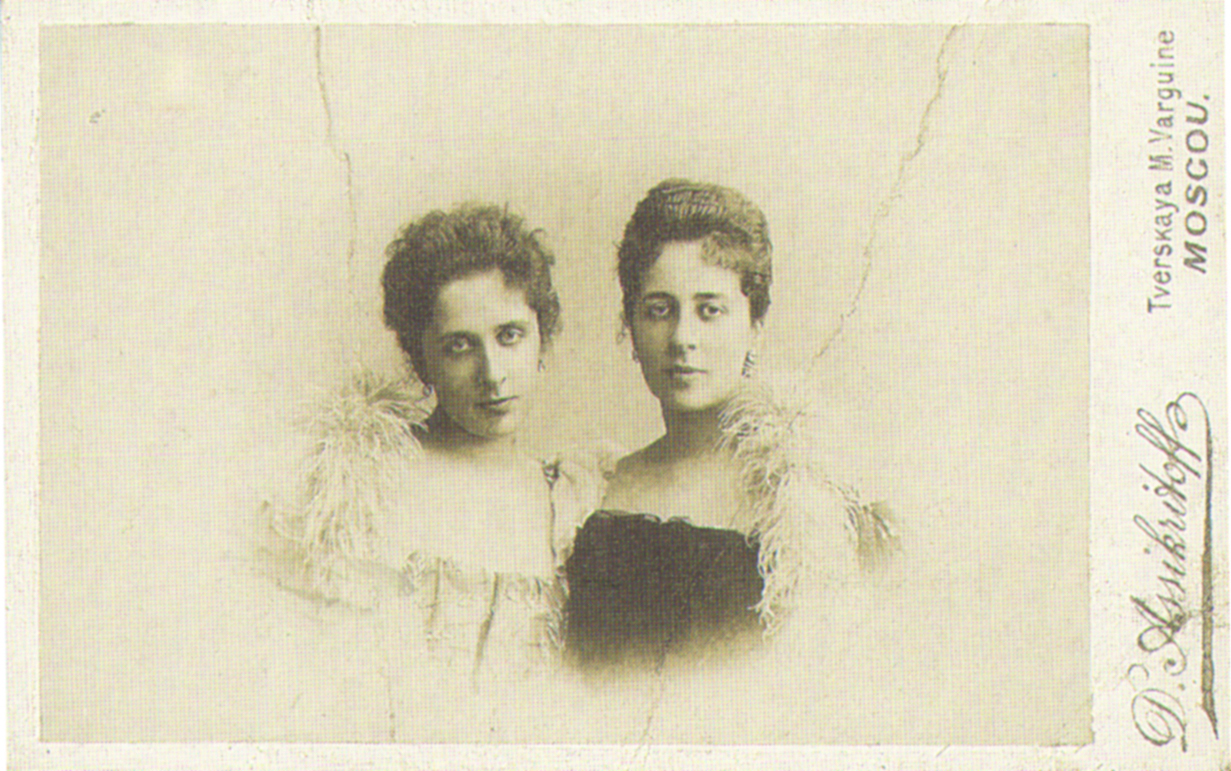 Сёстры Е. К. и М. К. Мамонтовы (в замужестве Е. К. Вострякова и М. К. Морозова)